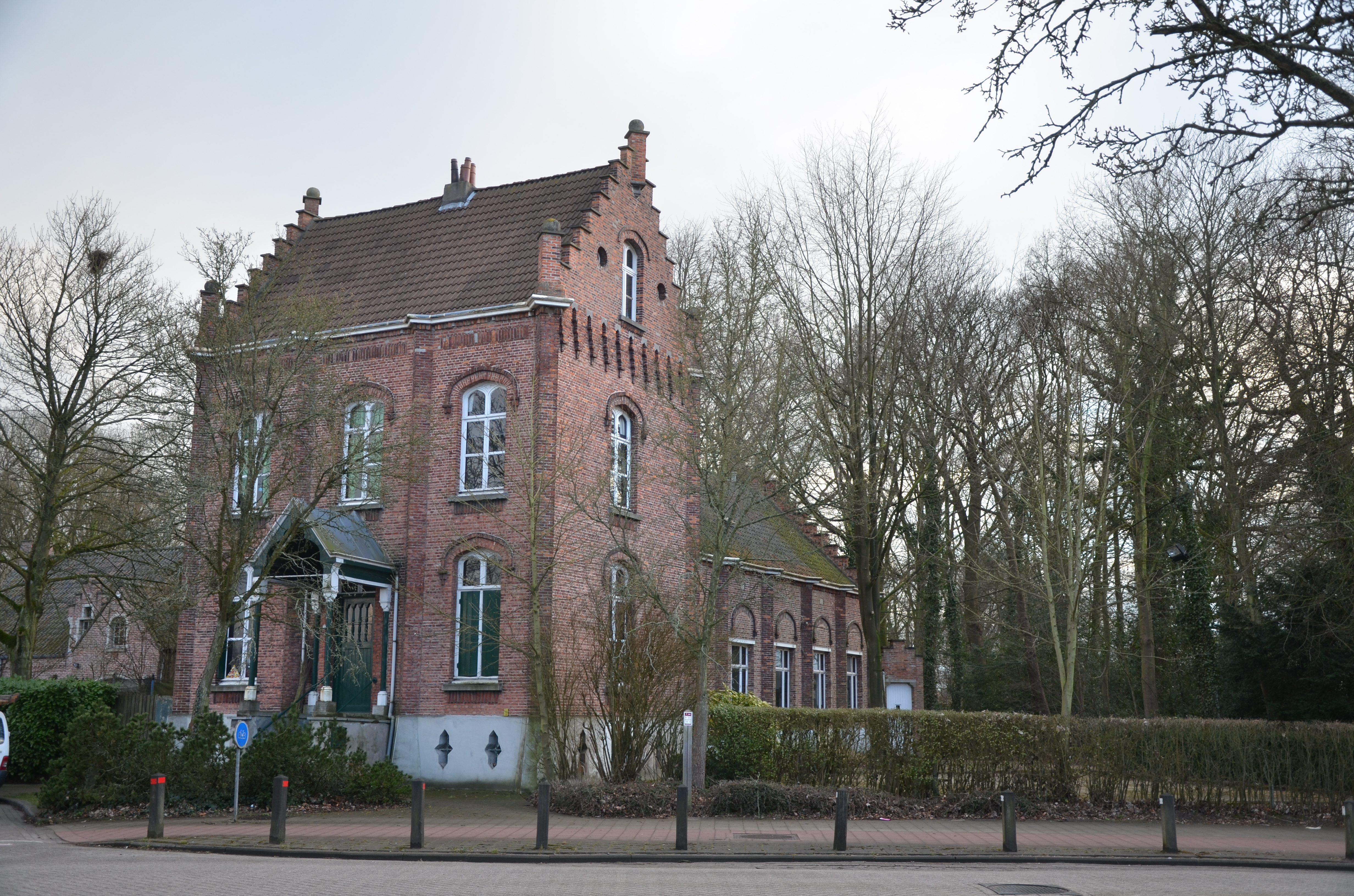 't Papscholeke, Laarstraat 26, Reet, Beschermd Monument